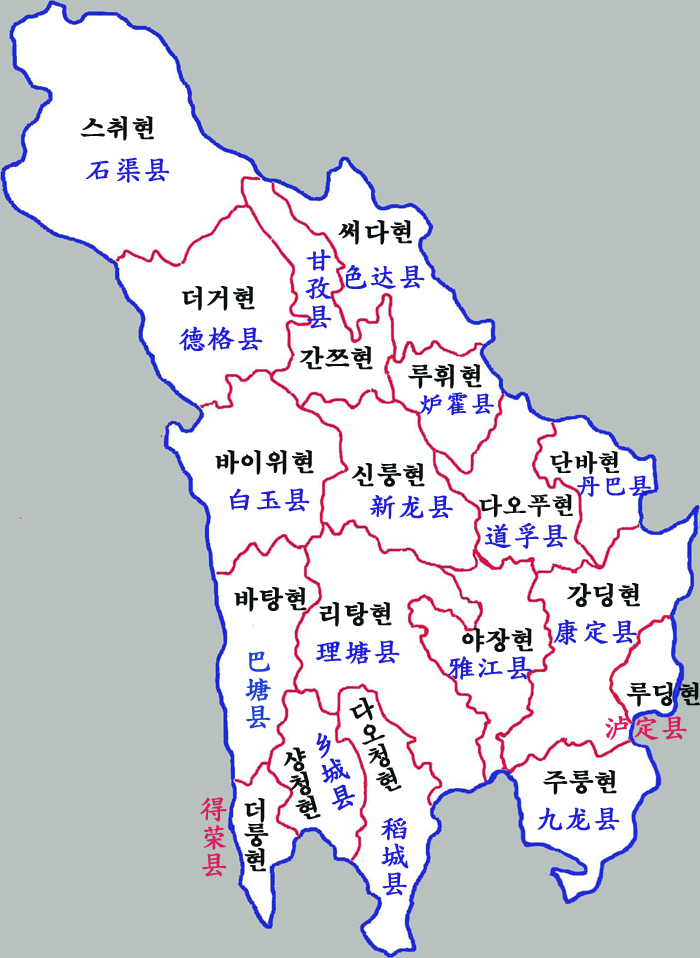 간쯔 티베트자치주 현급행정구역도